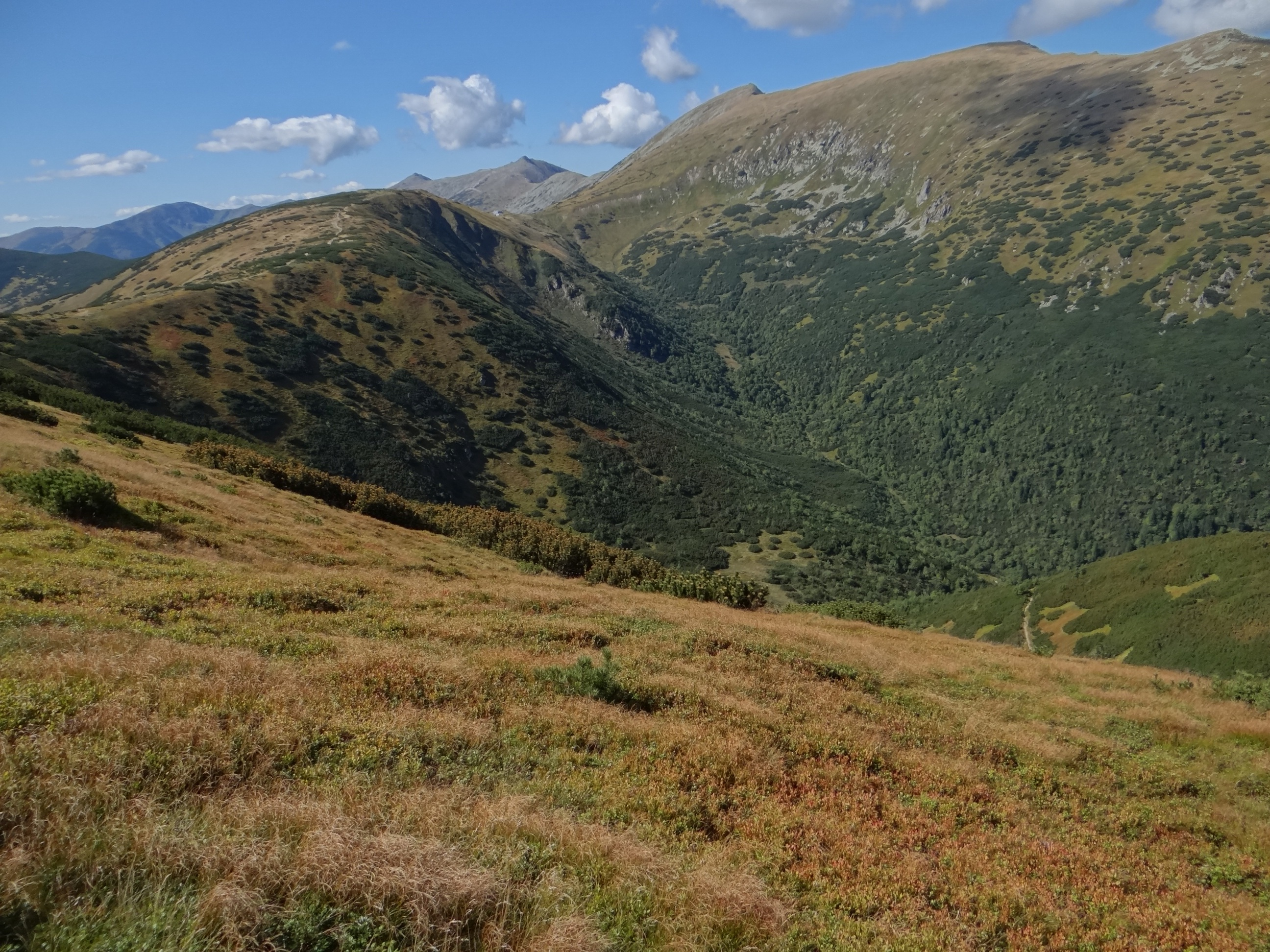 Štiavnica (valley)